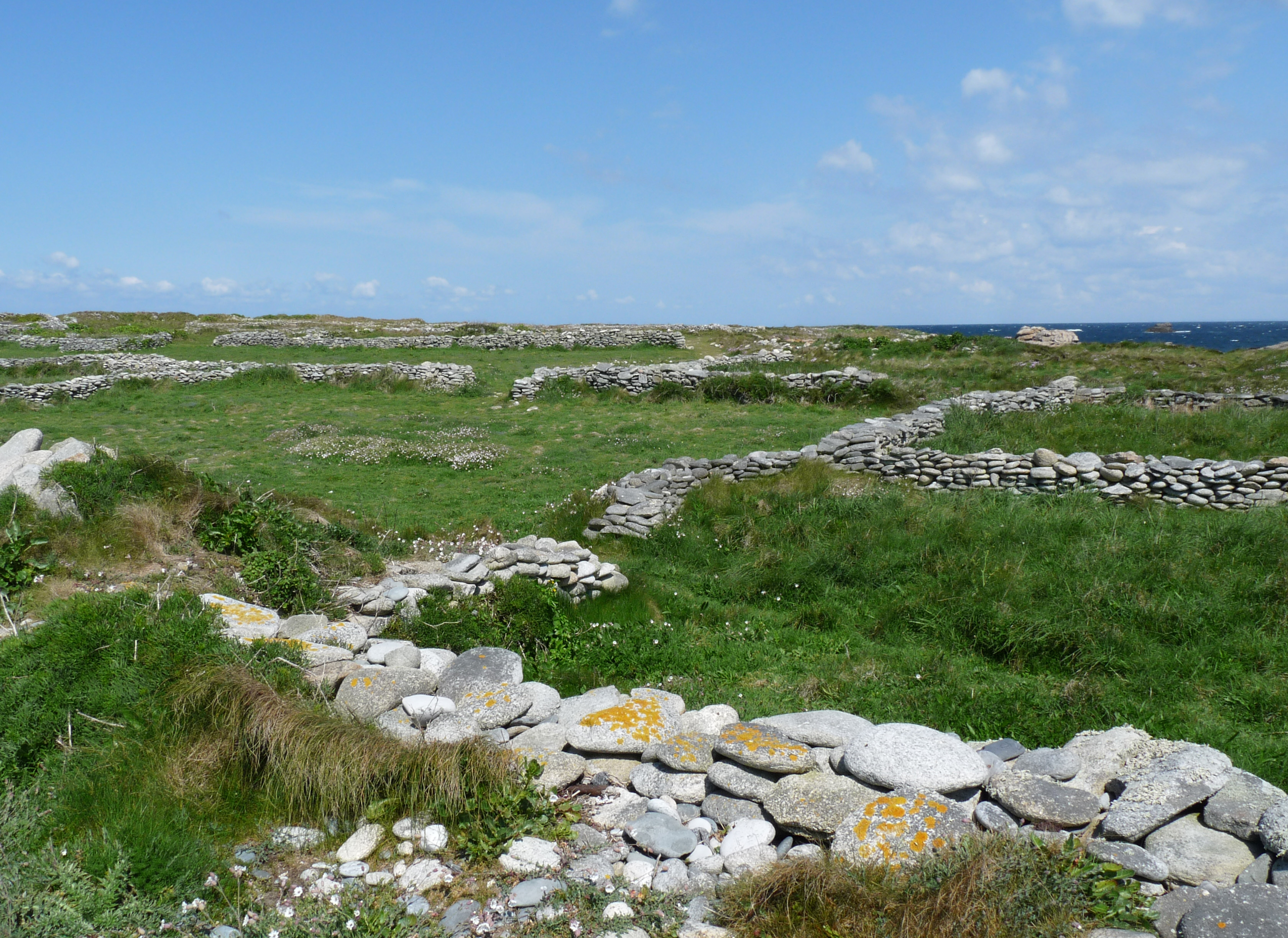 Murets de protection contre le vent à l'île de Sein (Finistère, Bretagne)